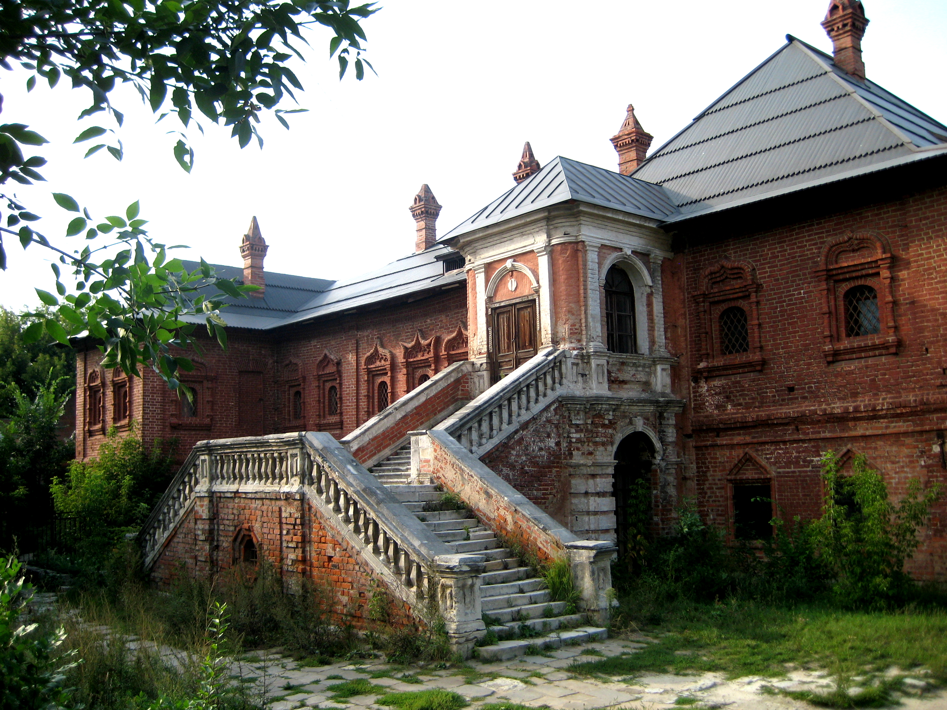 Крутицкое подворье